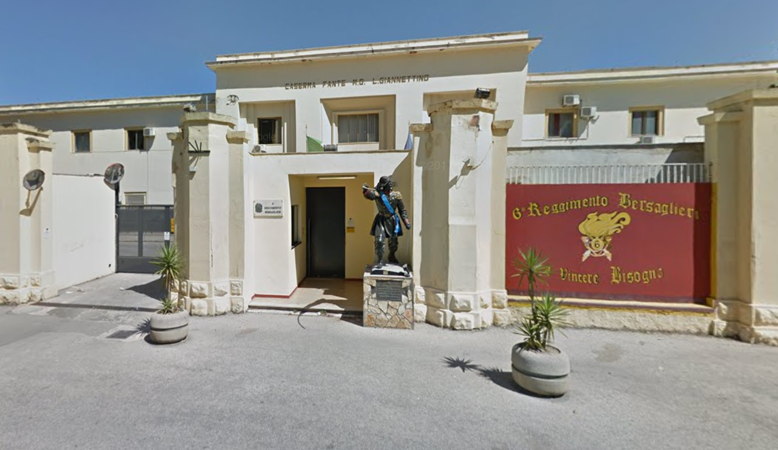 L'ingresso della Caserma "Luigi Giannettino" a Trapani, sede del 6° reggimento bersaglieri